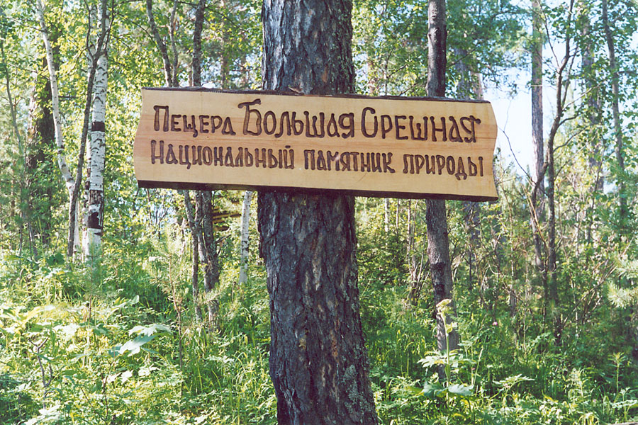 Табличка перед входом в пещеру Большая Орешная гласит "Национальный памятник природы".